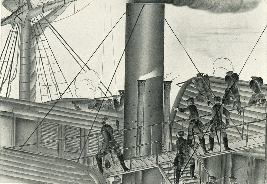 Japanese war in Miyakowan